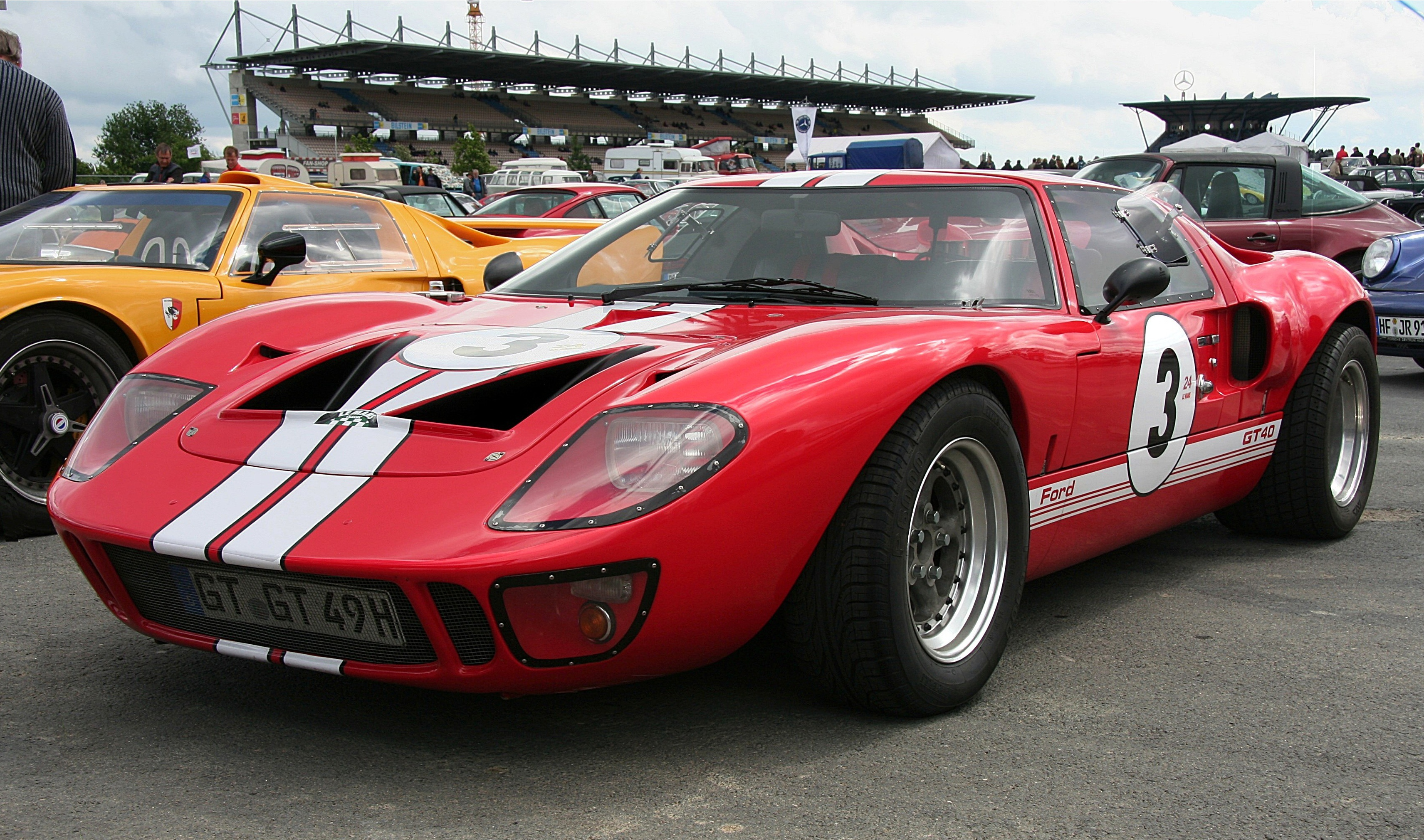 Ford GT 40 (Replikat)